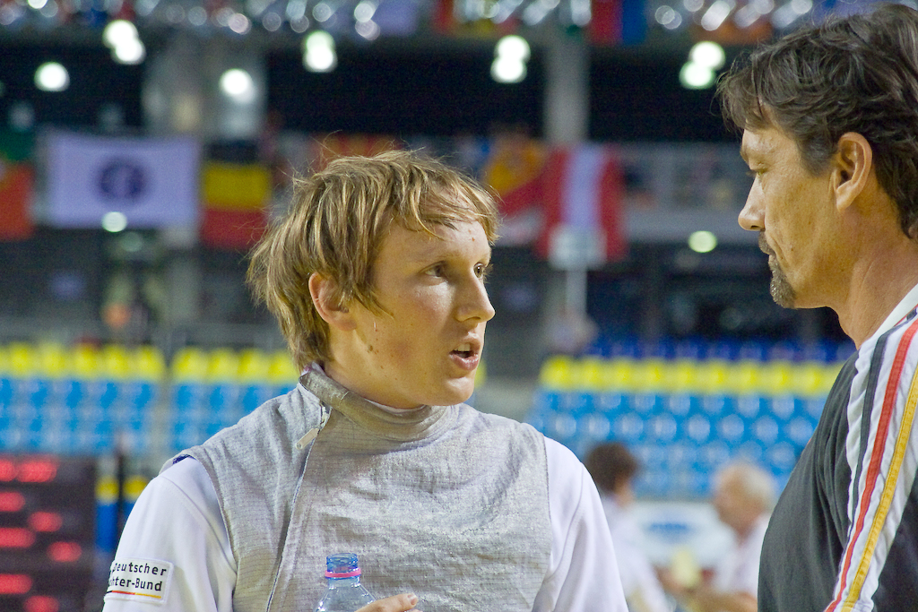 Prise le 3 juillet 2007 aux Championnats d'Europe d'escrime, à Gand (Flandre-Orientale) en Belgique. Benjamin Kleibrink, champion d'Europe par équipe au fleuret